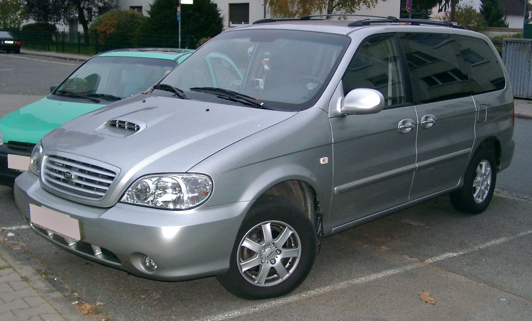 Kia Carnival, 1. Generation